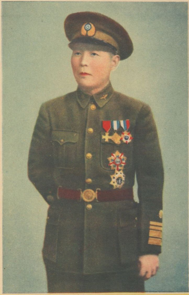 中文（中国大陆）: 中國空軍抗戰史畫插圖